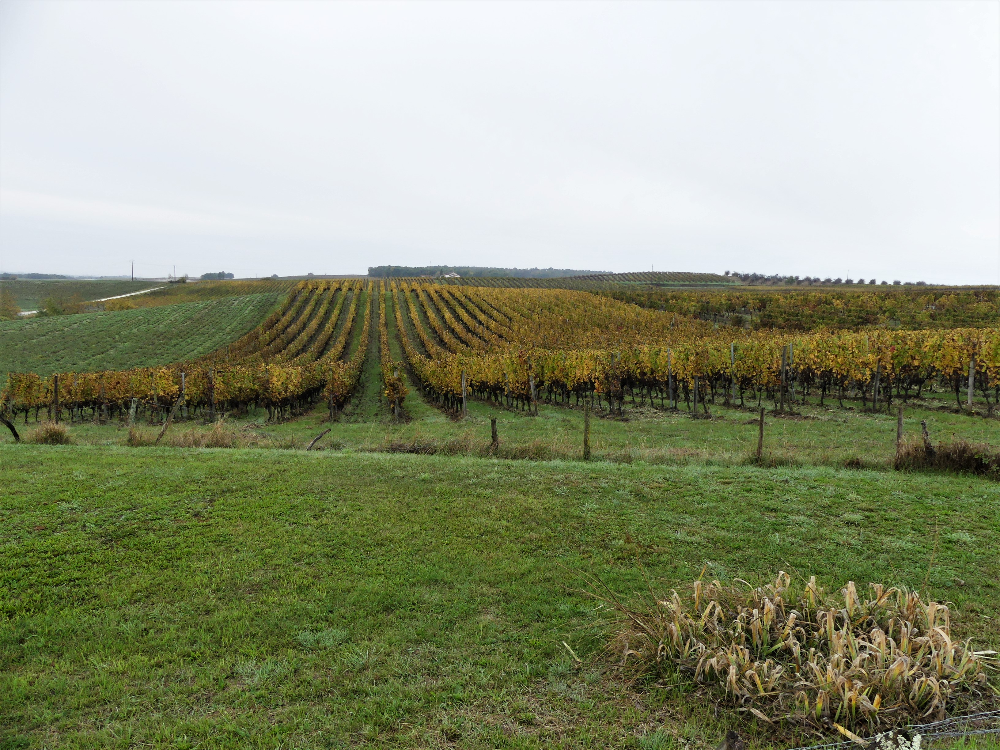 Vignes à Saint-Julien-d'Eymet, Dordogne, France.